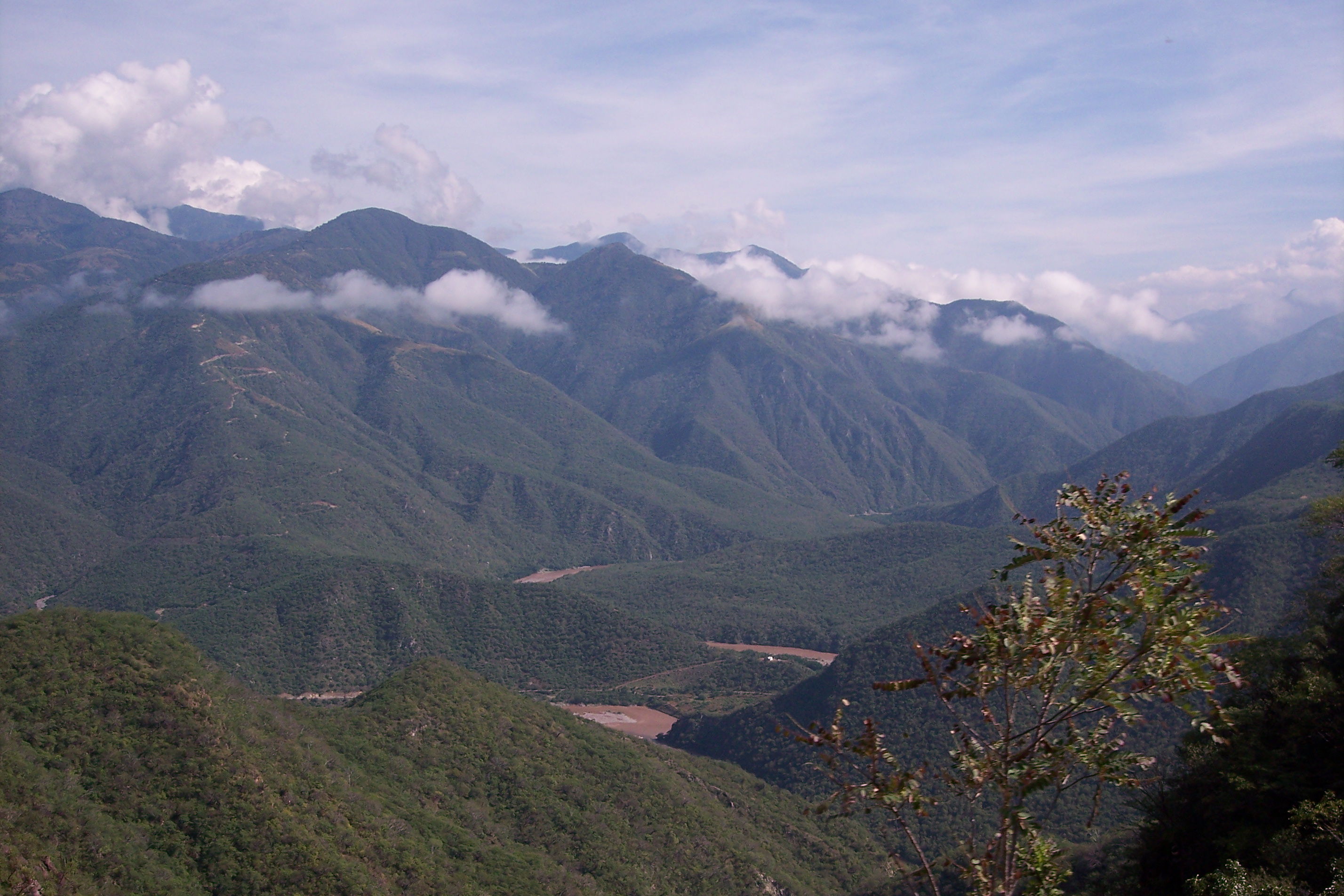 Impresionante como se ve el camino que va subiendo la sierra. Bajando para cruzar el Río Santiago (también cruzar de Jalisco a Nayarit). See where this picture was taken. [?]